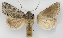 Psammopolia arietis male